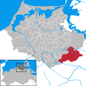 Süderholz in Mecklenburg-Vorpommern - District Nordvorpommern